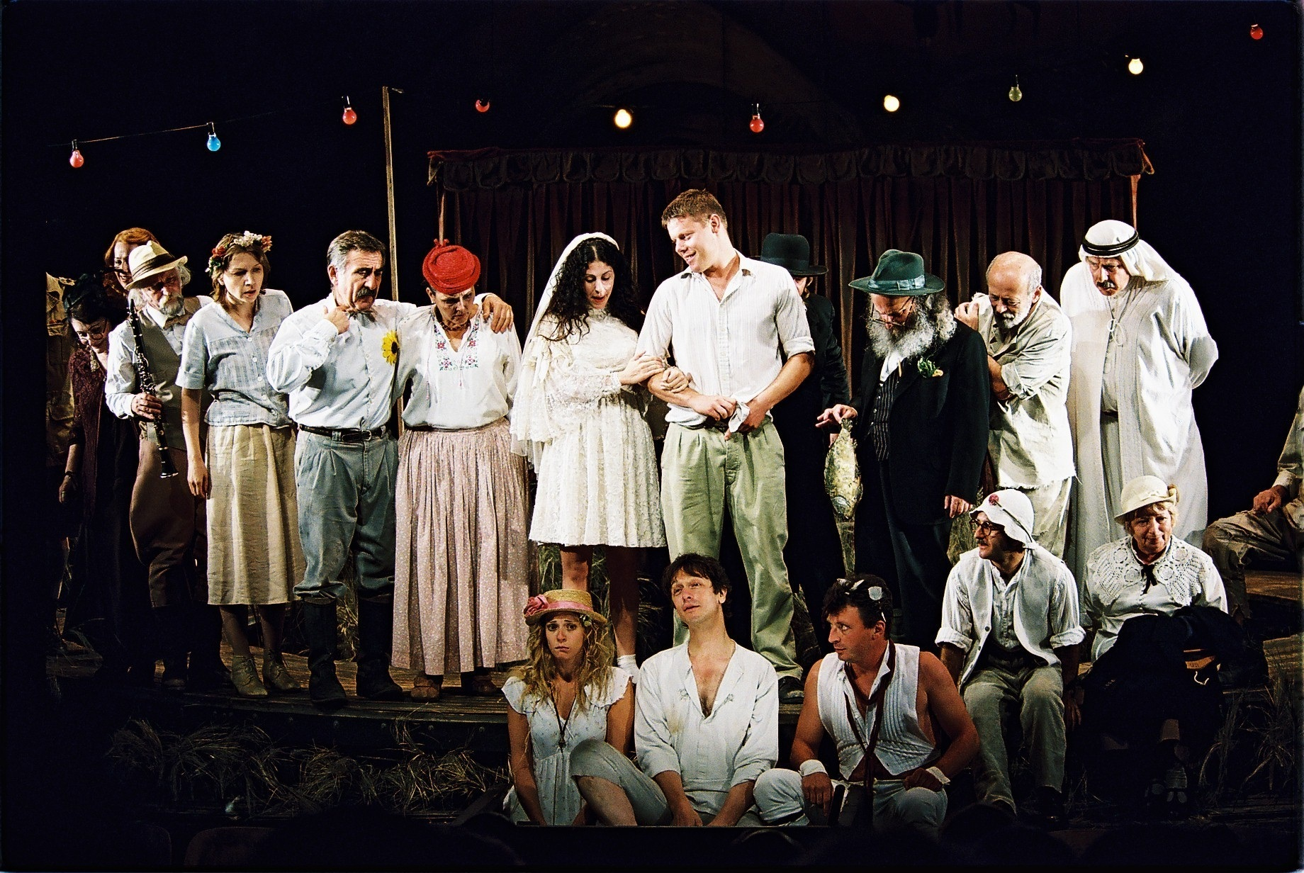 חתונה בהצגה "כפר", תיאטרון גשר